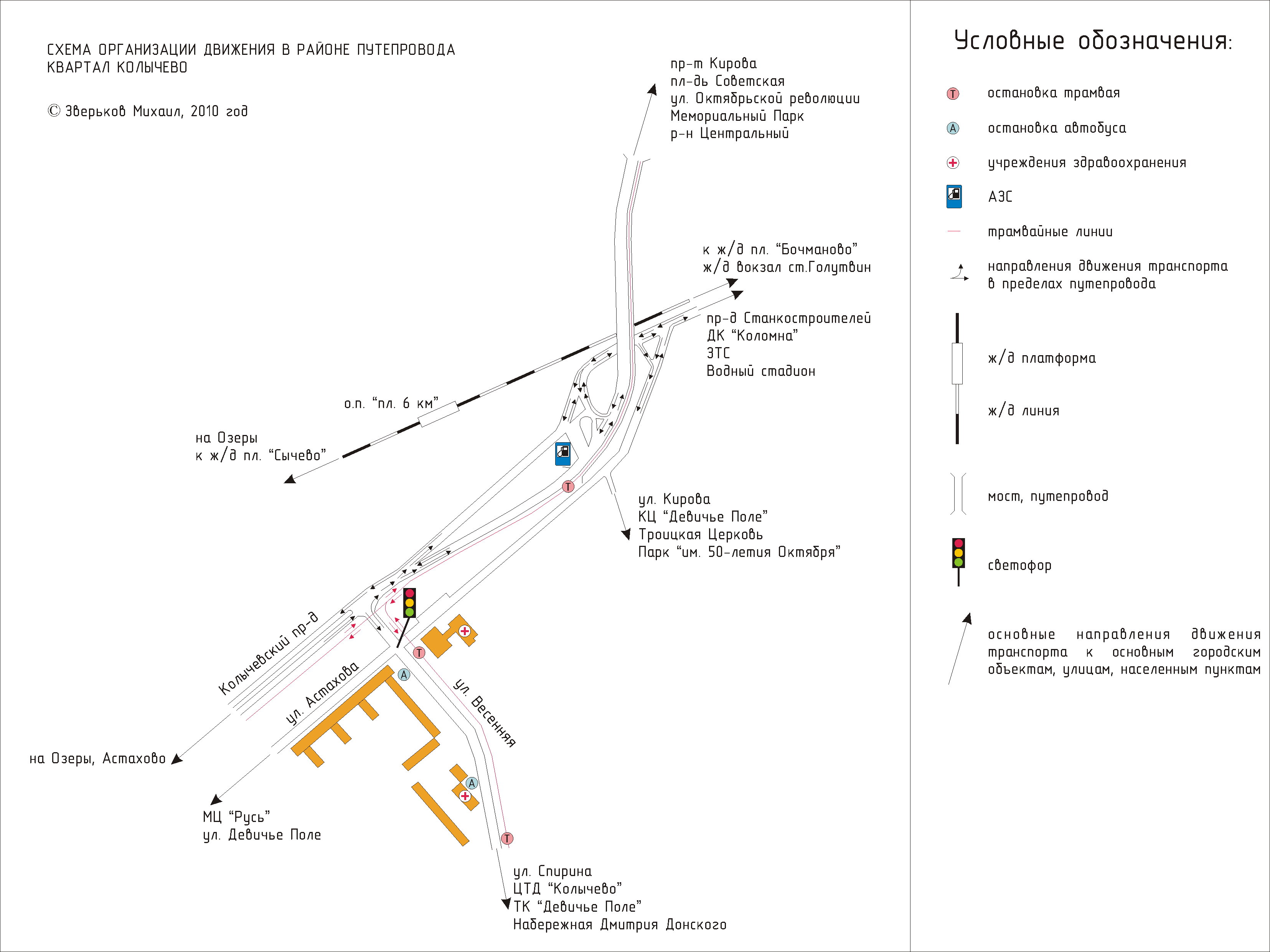 Схема организации движения транспорта в районе путепровода, квартал Колычево (Коломна)